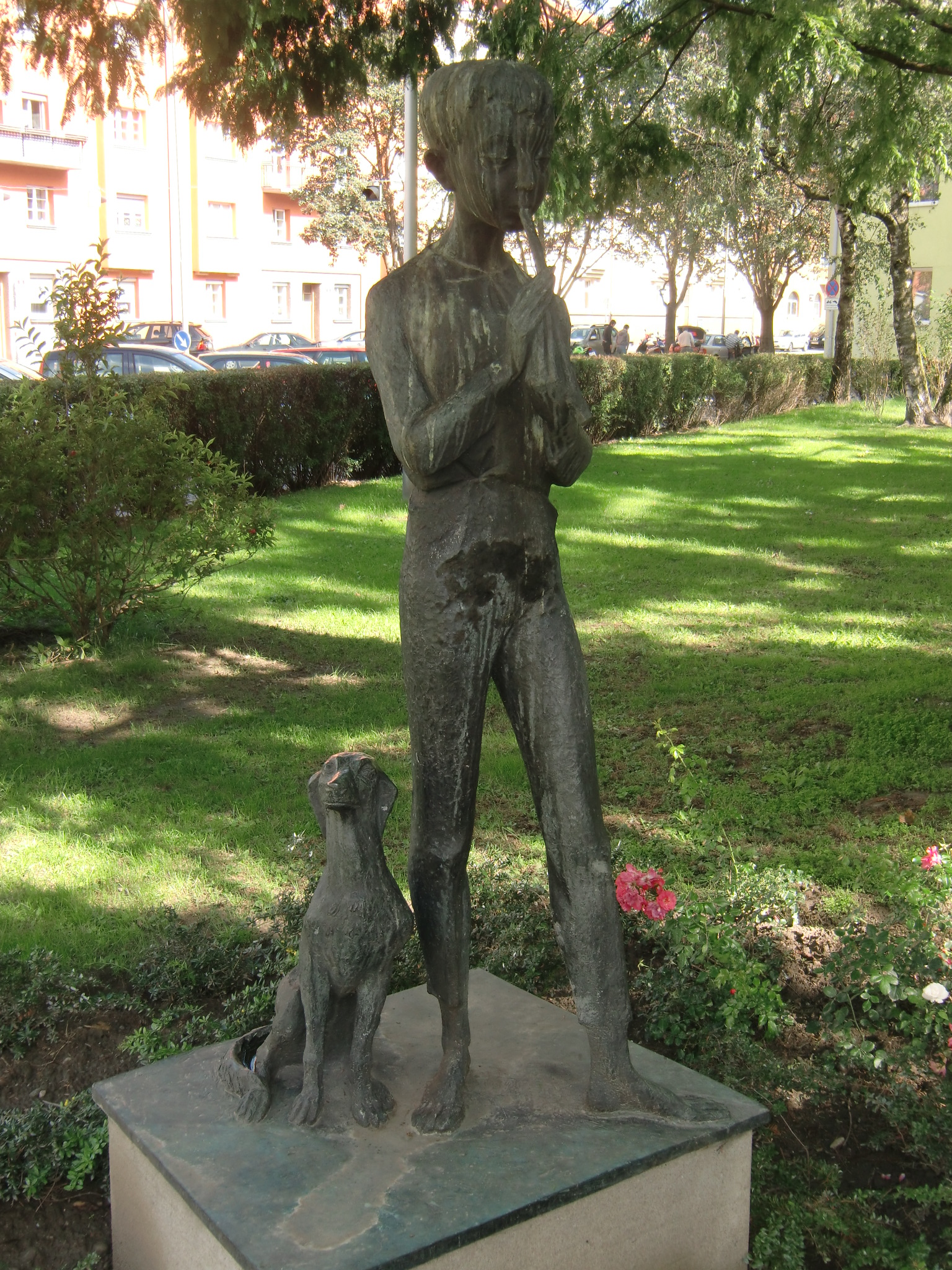 Figur Maienflötenspieler